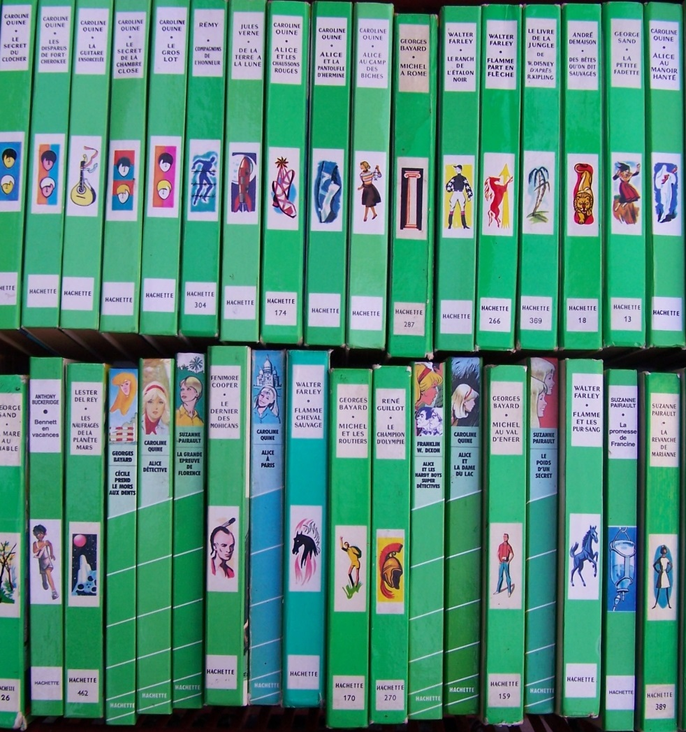 Livres de la bibliothèque verte: Caroline Quine Rémy Jules Verne Georges Bayard Walter Farley Kipling André Demaison George Sand Anthony Buckeridge Lester Del Rey Suzanne Pairault Fenimore Cooper René Guillot Franklin W. Dixon